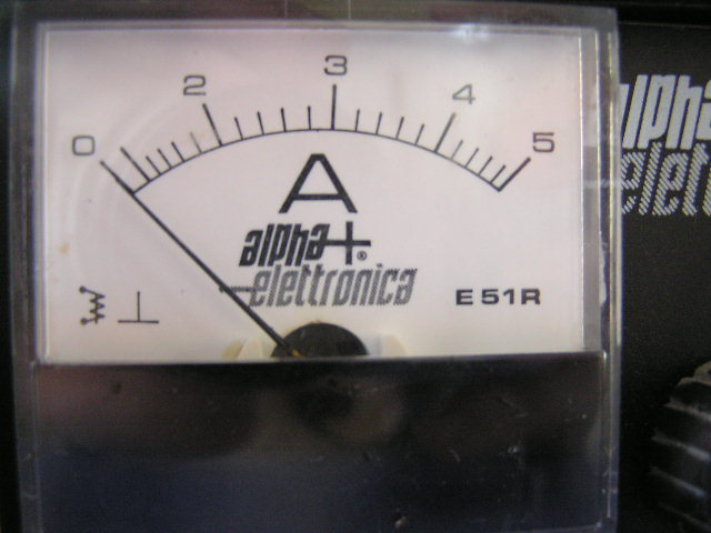 Ampèremetre d'une alimentation stabilisée